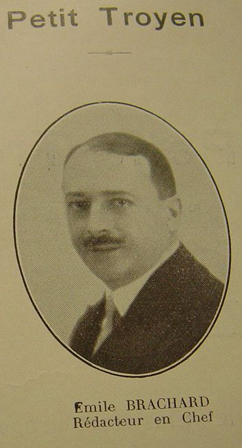 photo de Emile BRACHARD rédacteur en chef du Petit Troyen parue dans l'Almanach du Petit Troyen